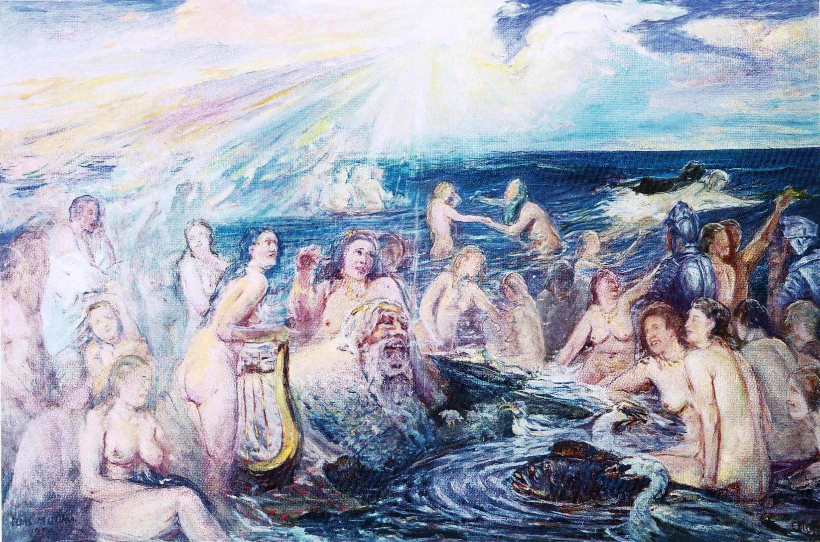 Elias Muukan maalaus suomalaisesta vedenjumala Ahdista. Maalauksen omistaa Lallukan taiteilijakotisäätiö.